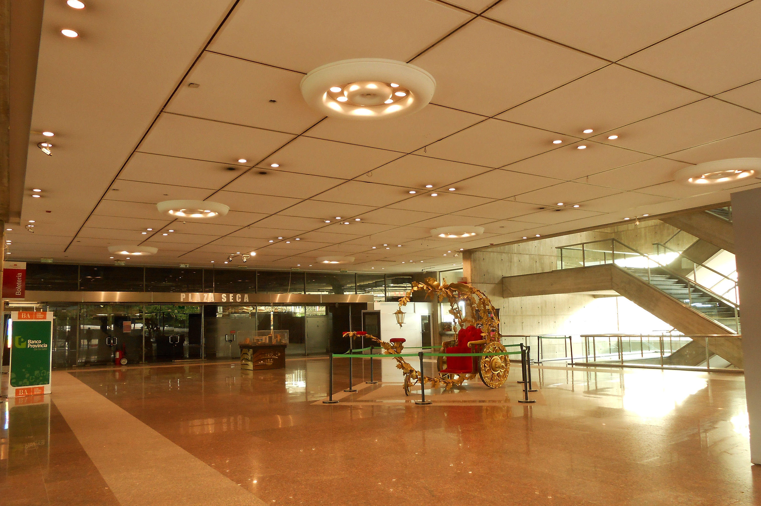 Hall de entrada al Teatro Argentino de La Plata - Buenos Aires - Argentina.